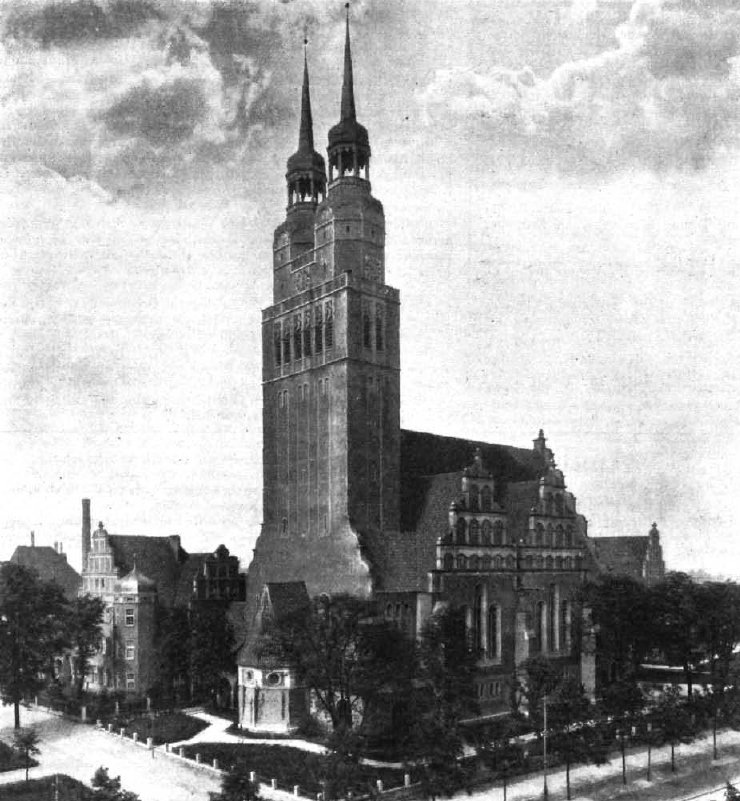 Pauluskirche in Breslau, 1945 zerstört.